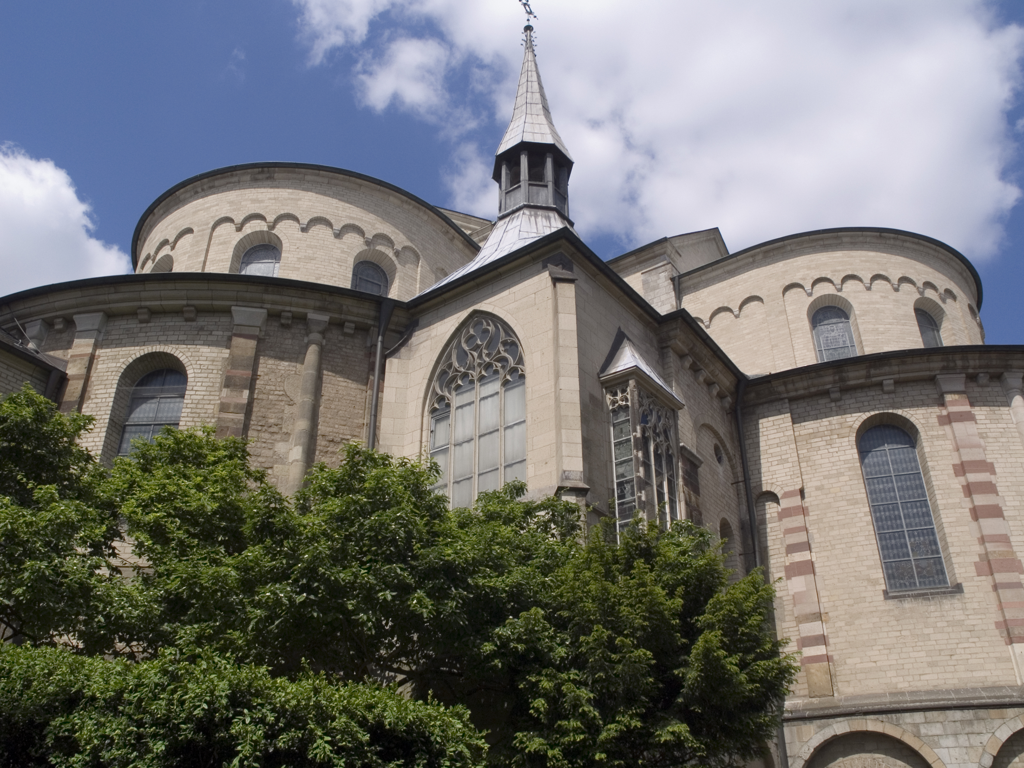 Северный Рейн-Вестфалия, Кёльн - Церковь святой Марии Капитолийской